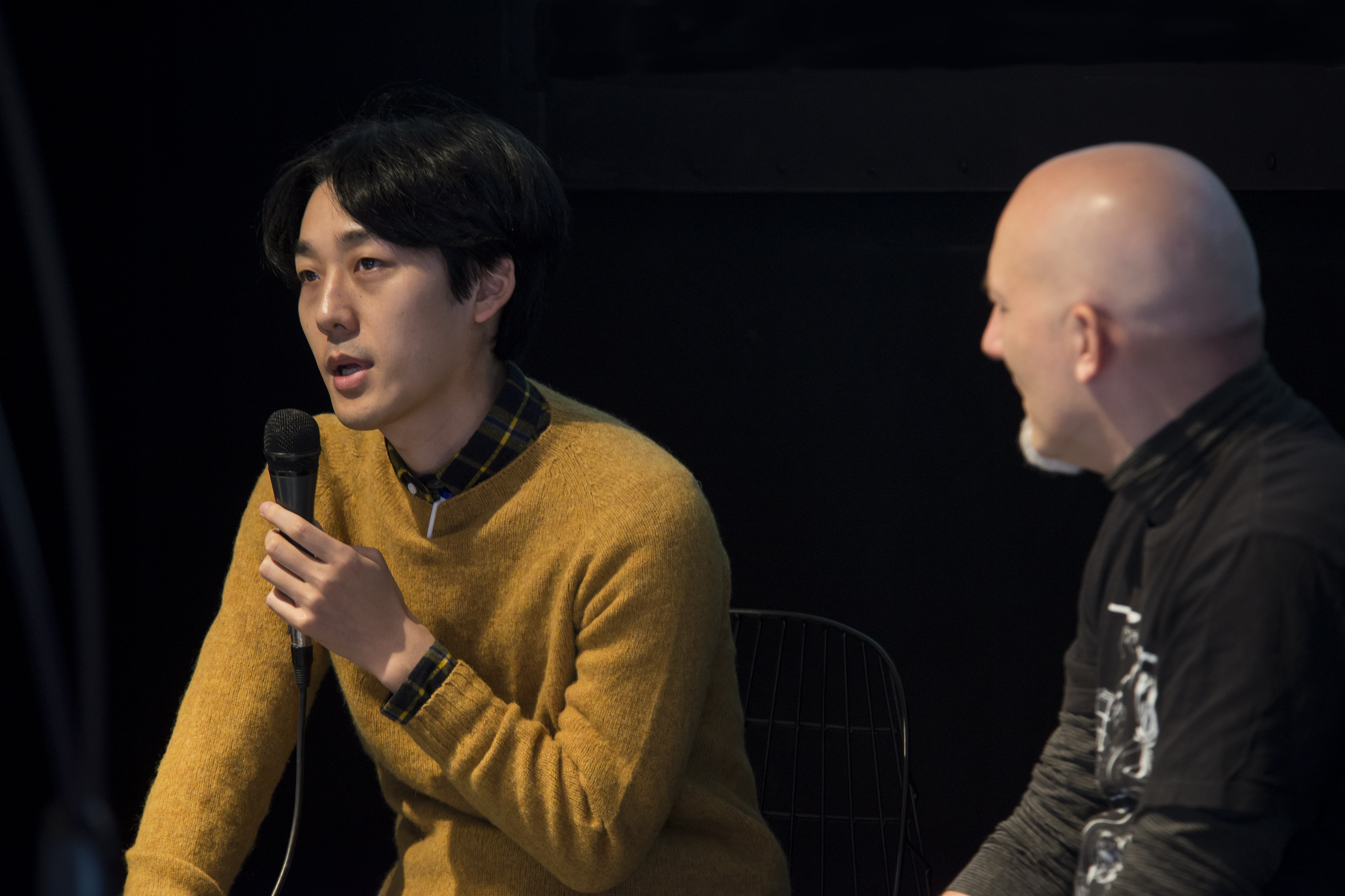 Rencontre avec Shinzo Keigo au Pavillon Manga, Festival d'Angoulême 2018.